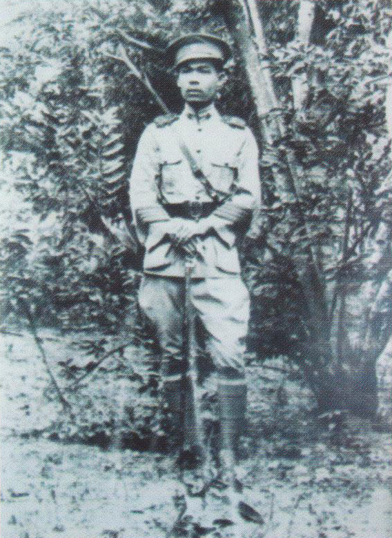 นายหนู นาคามดีครูใหญ่ผู้บุกเบิกโรงเรียนชัยภูมิภักดีชุมพล ท่านมีชีวิตอยู่ระหว่างปี พ.ศ. 2435 - 2518